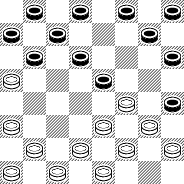 Слепая партия